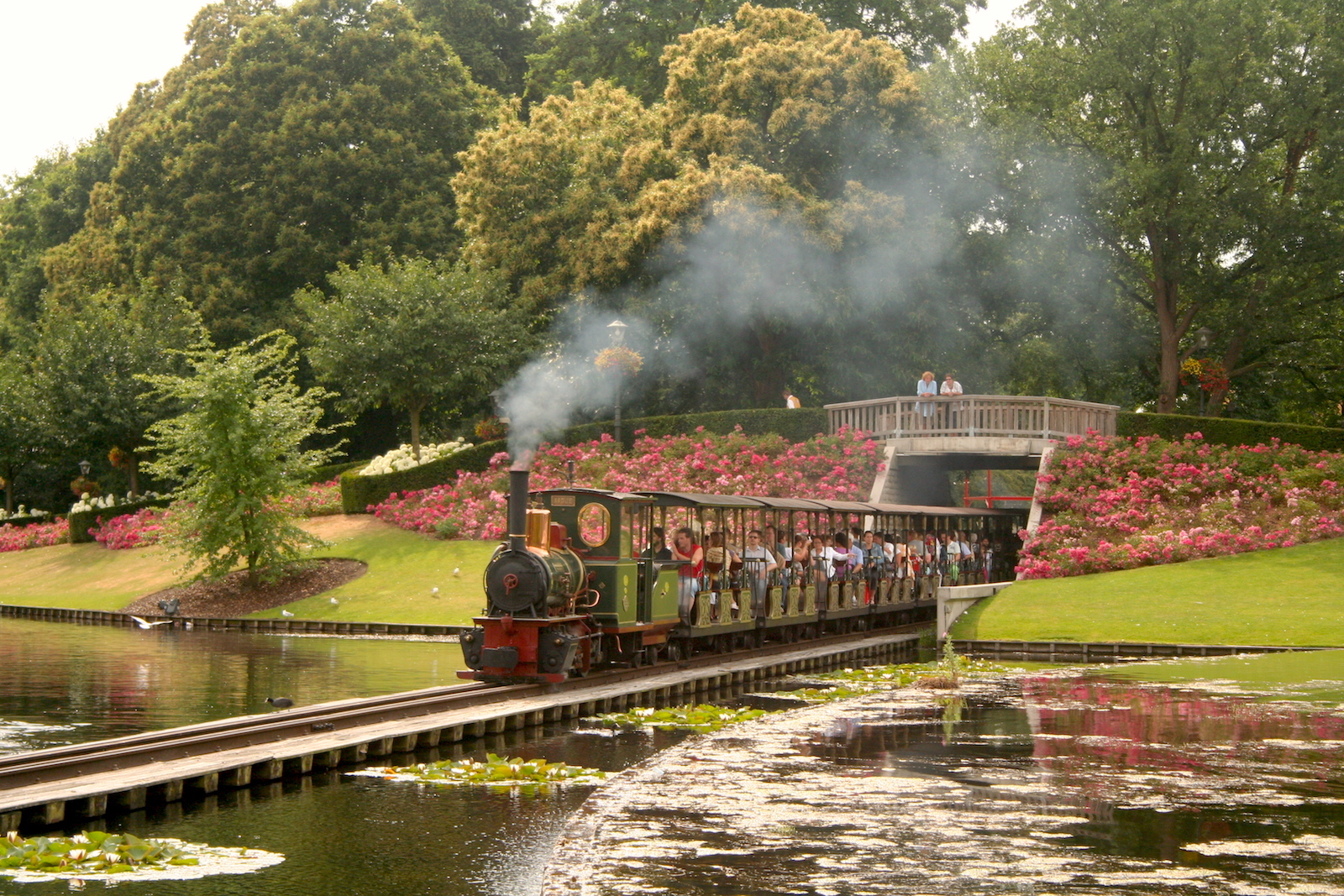 Locomotief 'Aagje' van de Efteling Stoomtrein Maatschappij met trein rijdt over de brug in de Grote Vijver. Foto: Erik Swierstra.